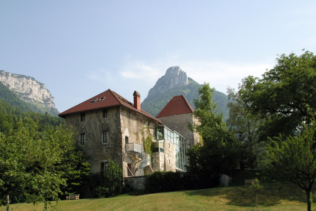 Vue de la fondation pour l'art contemporain Salomon, Alex (France - 74 )